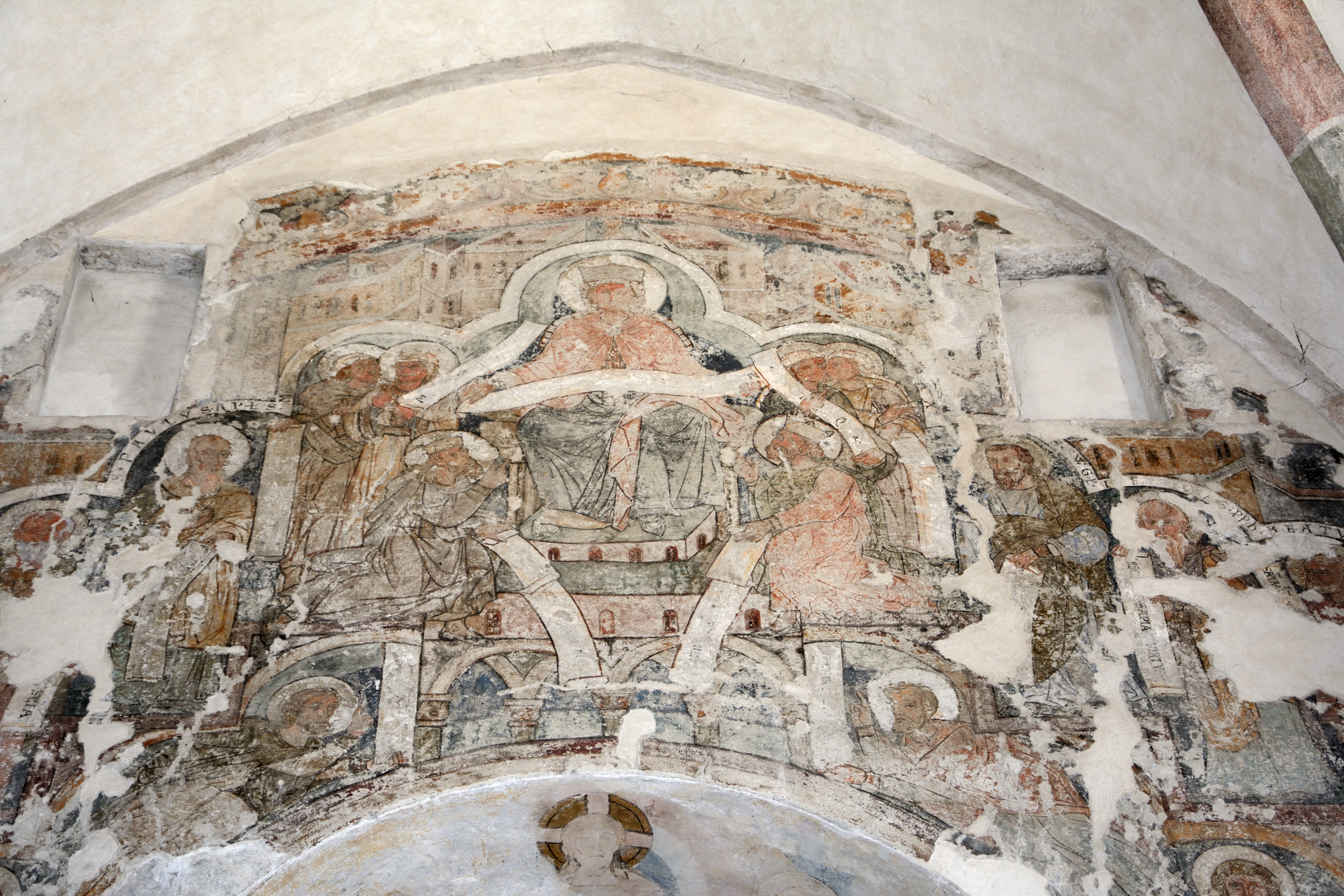 St. Johannes im Kreuzgang in Brixen: romanisches Fresko die alttestamentliche Weisheit an der Ostwand über dem Triumphbogen, entstanden um 1220. Die Weisheit (Sophia) mit Krone und Spruchband sitzt umgeben von Barmherzigkeit und Wahrheit (links) sowie von Gerechtigkeit und Friede (rechts), dazu zwei Könige (David und Salomo?) und acht Männergestalten (darunter Daniel und Paulus).